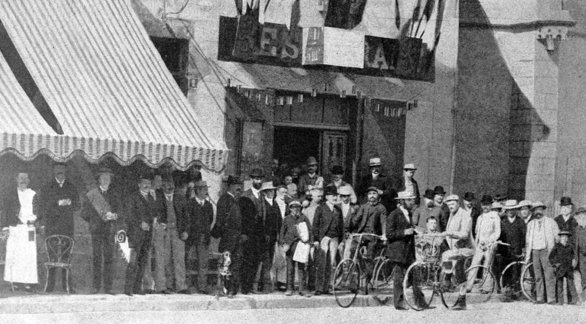 Paris-Brest-Paris 1891, le contrôle de Saint-Brieuc.